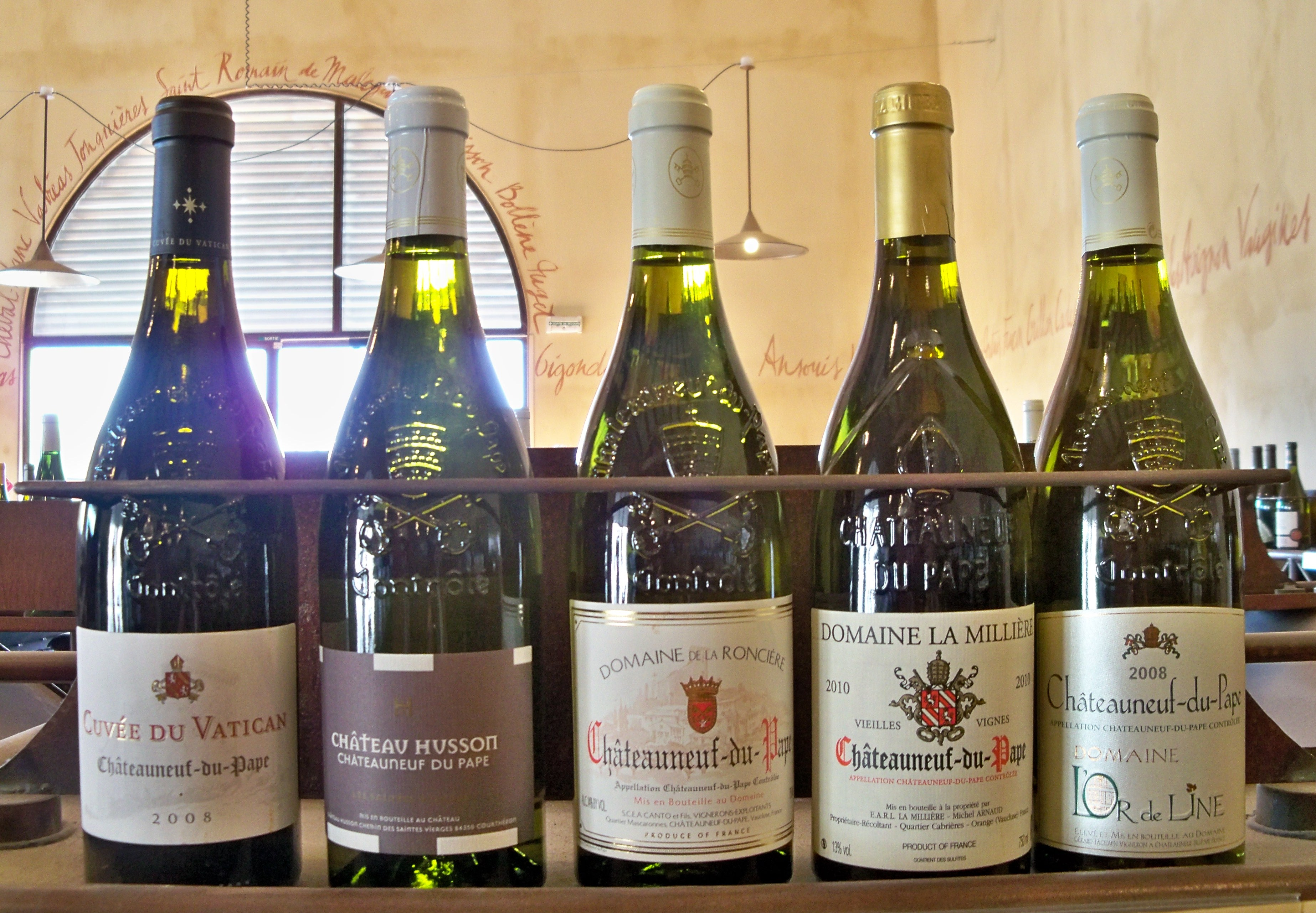 bouteilles de Chateauneuf du Pape blanc